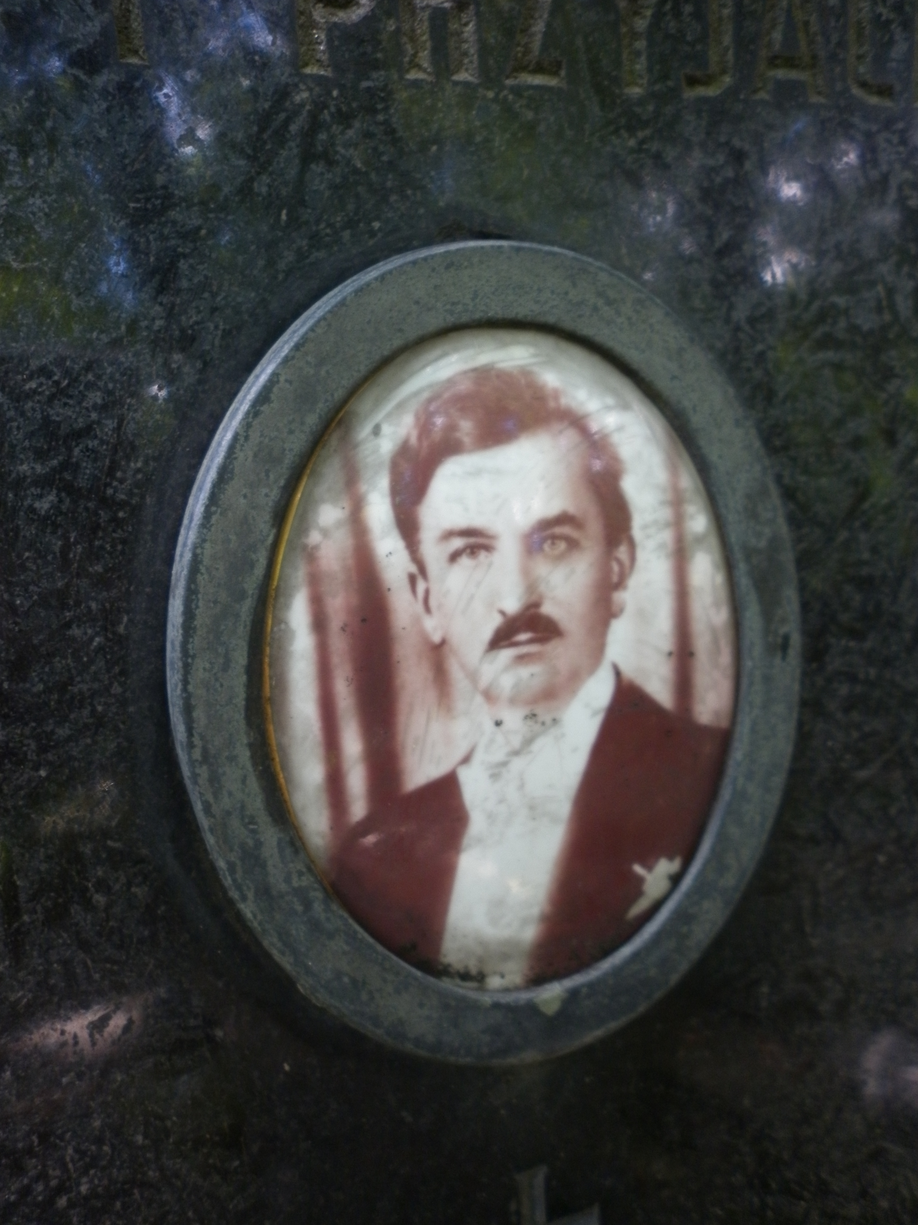 Aleksander Sobiszewski